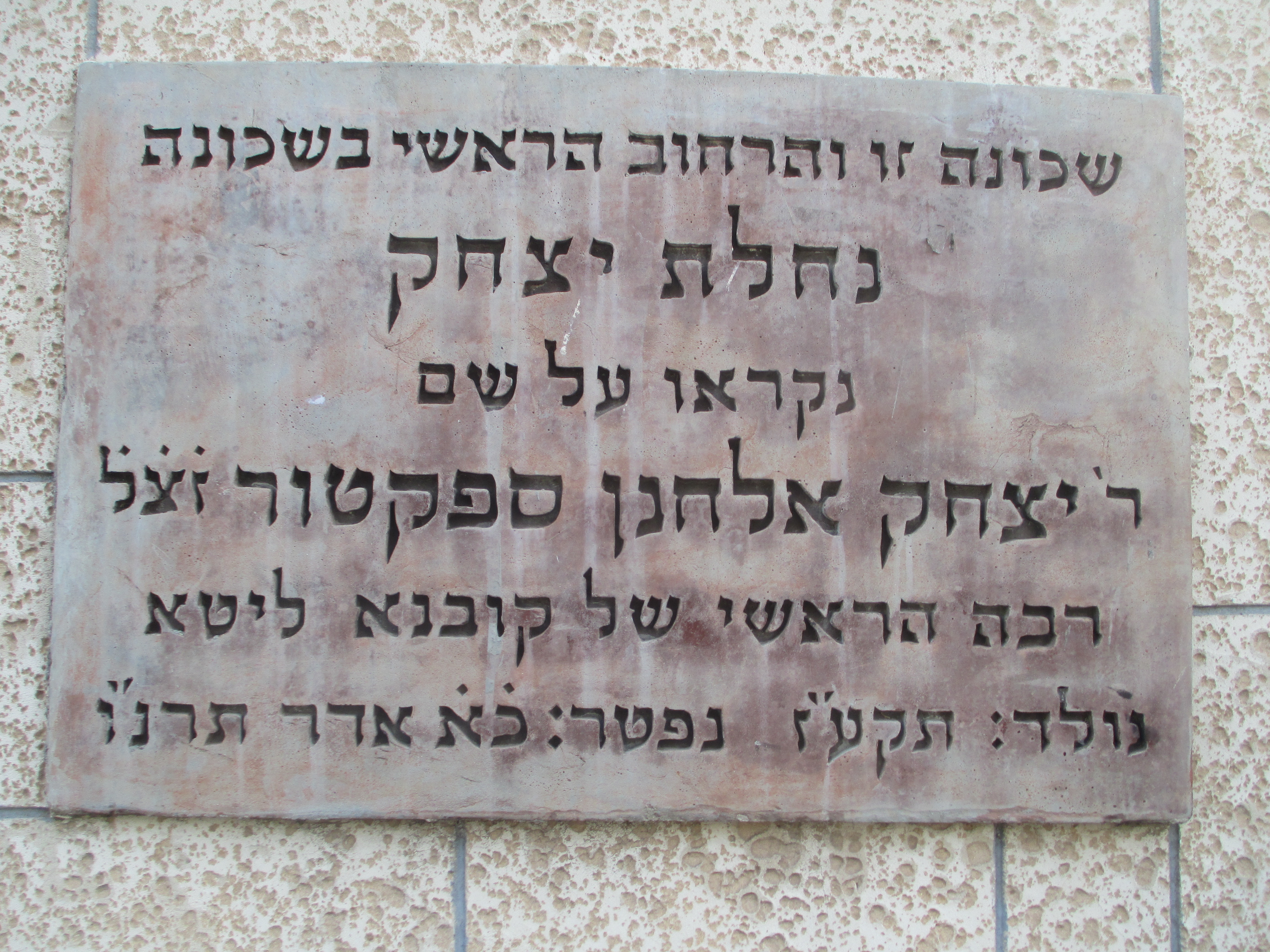 לוחית זיכרון בנחלת יצחק